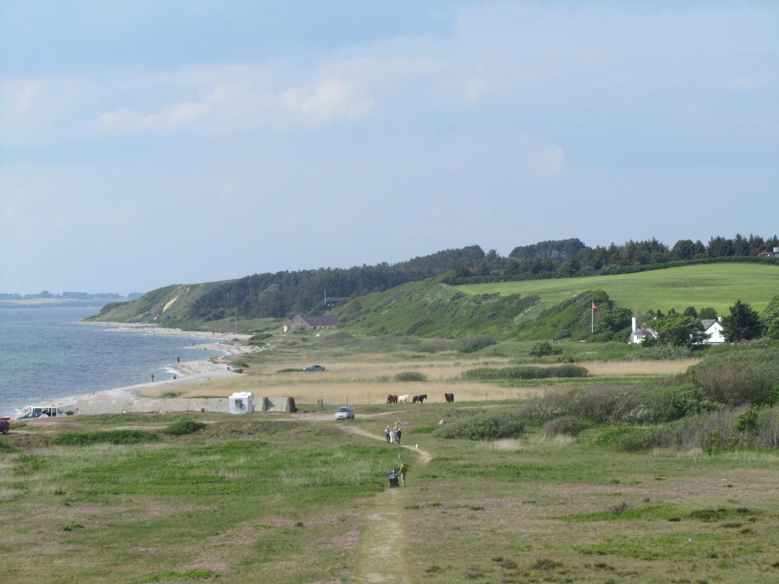 Strandeng ved Sletterhage set fra fyret